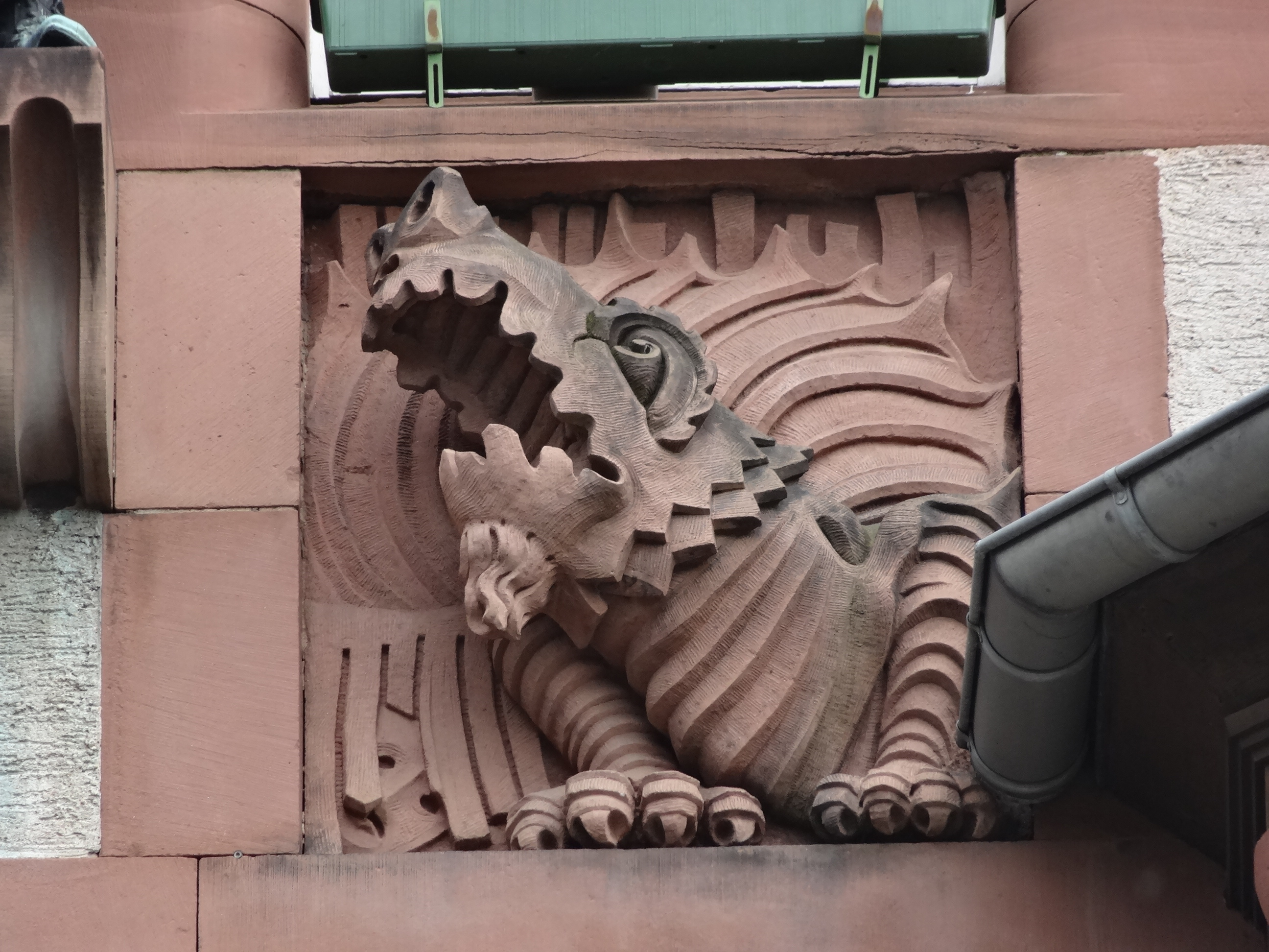 Haus Haardteck, Herdweg 79 in Darmstadt